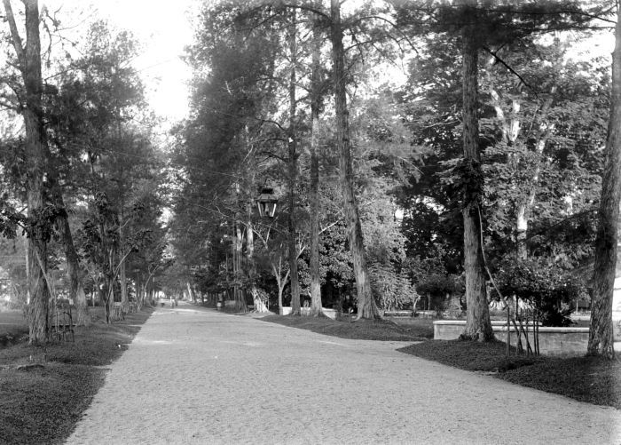 Repronegatief. Laan in Sibolga, residentie Tapanoeli, Sumatra